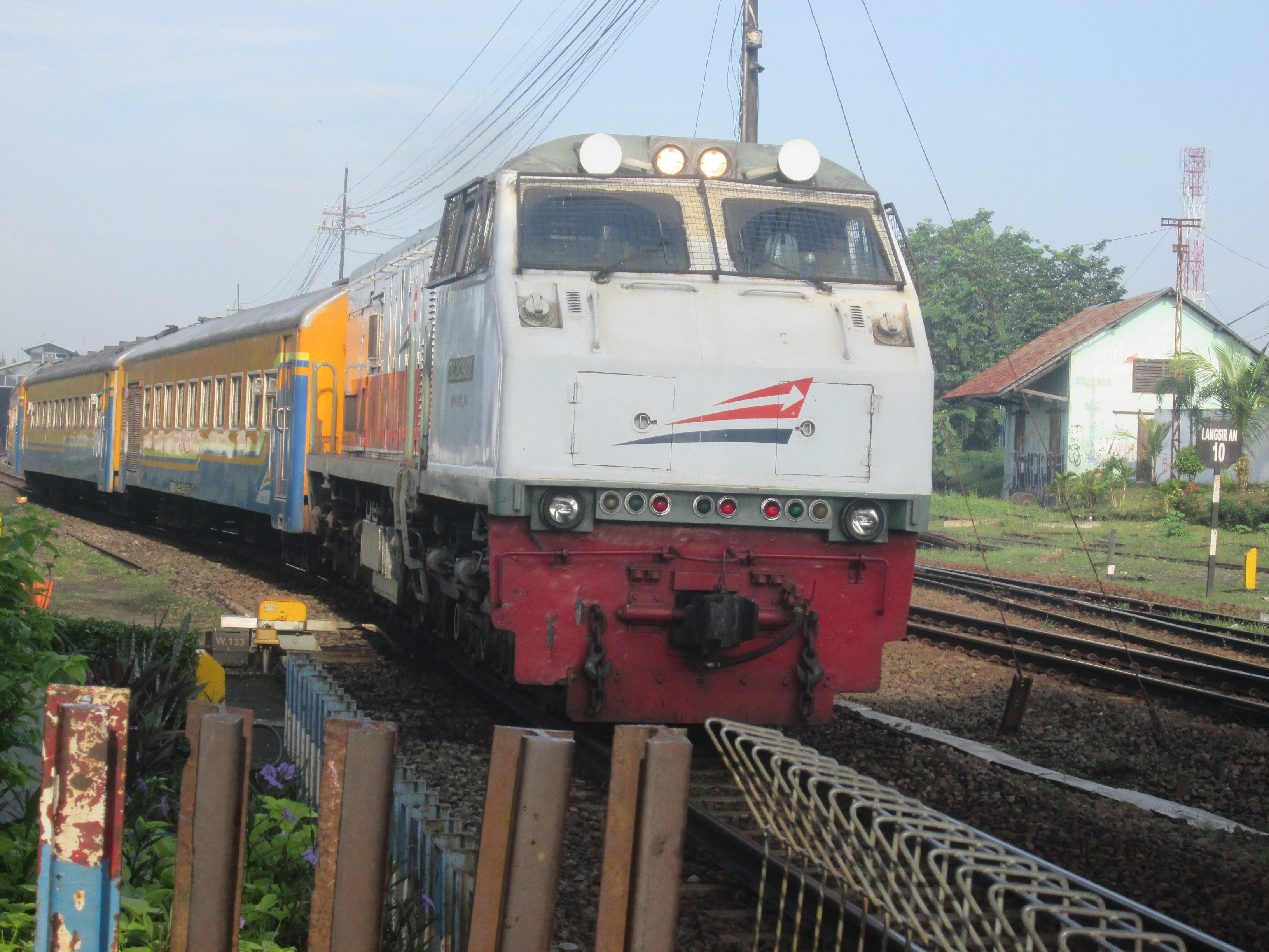 Kereta api Sri Tanjung ditarik CC 203 98 01